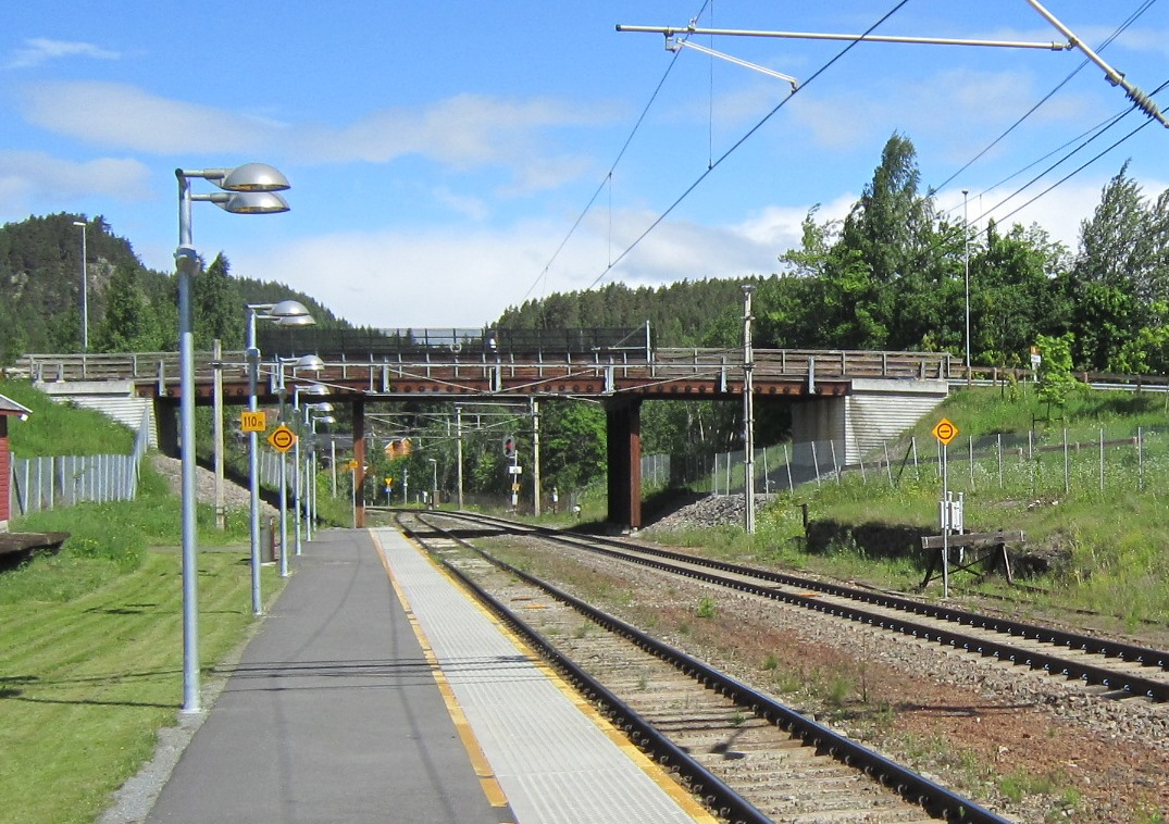 Fylkesvei 222 krysser Dovrebanen like nord for Tangen stasjon